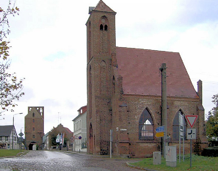 Im Vordergrund rechts das ehemalige Heilig-Geist-Hospital (Spittel) in Gartz (Oder), in gotischem Stil erbaut und um 1280 erstmals erwähnt. Heute nutzt der Heimatverein das Gebäude. Im Hintergrund links das im 13. Jahrhundert errichtete Stettiner Tor, das einzig erhaltene von ehemals vier Stadttoren.